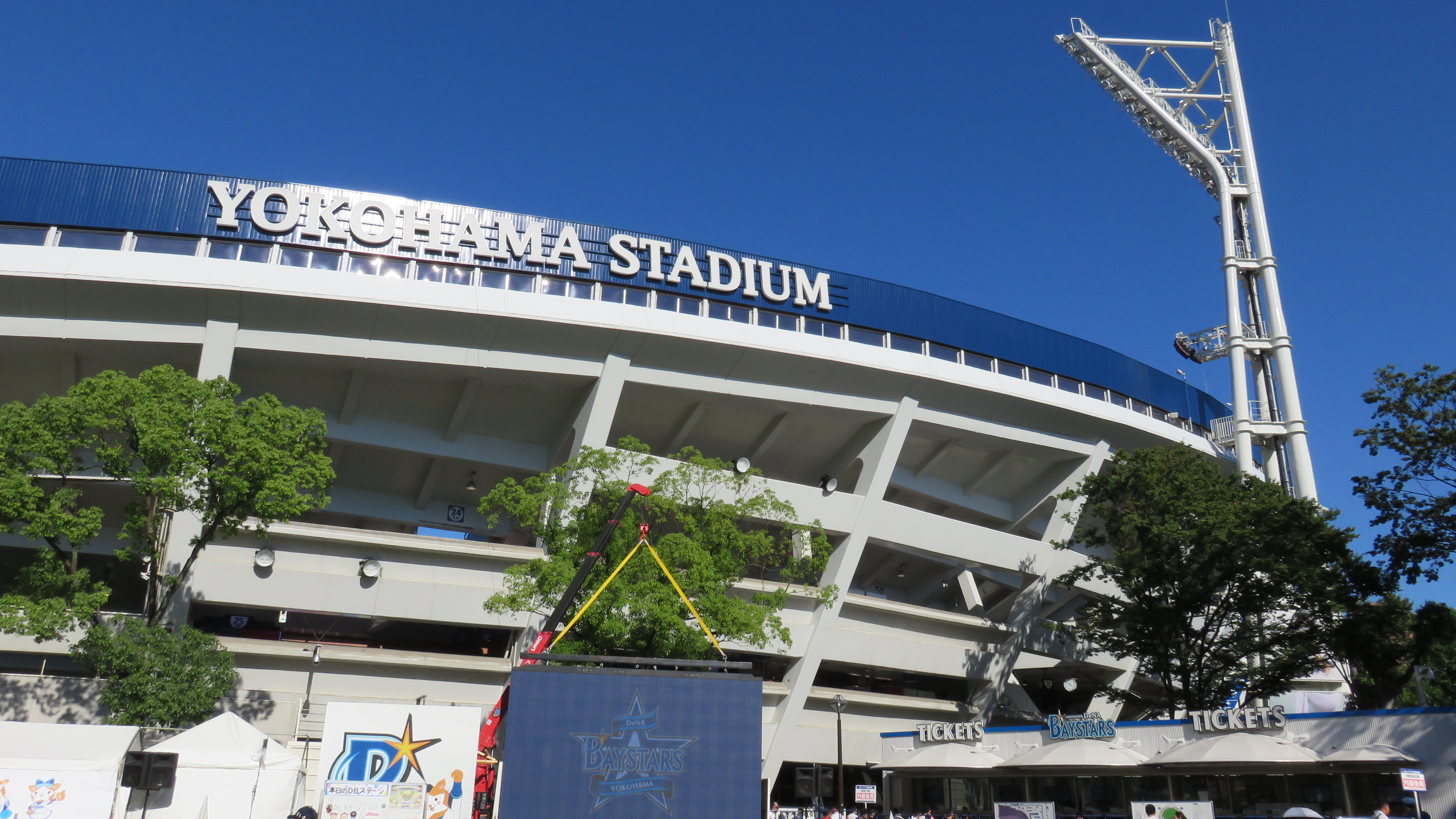 横浜スタジアム外観、自分（Haruakibay）が撮影